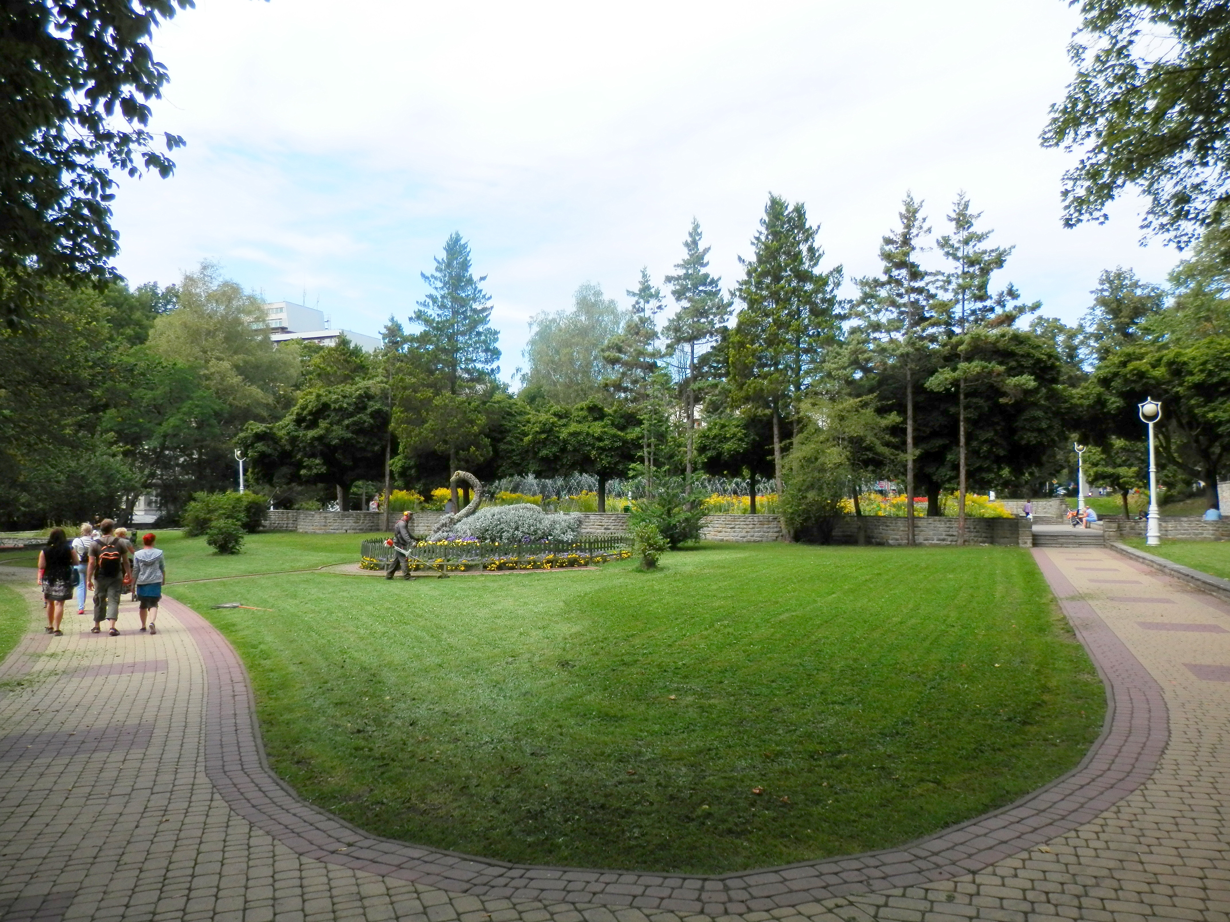 Poľské kúpeľné mestečko Krynica